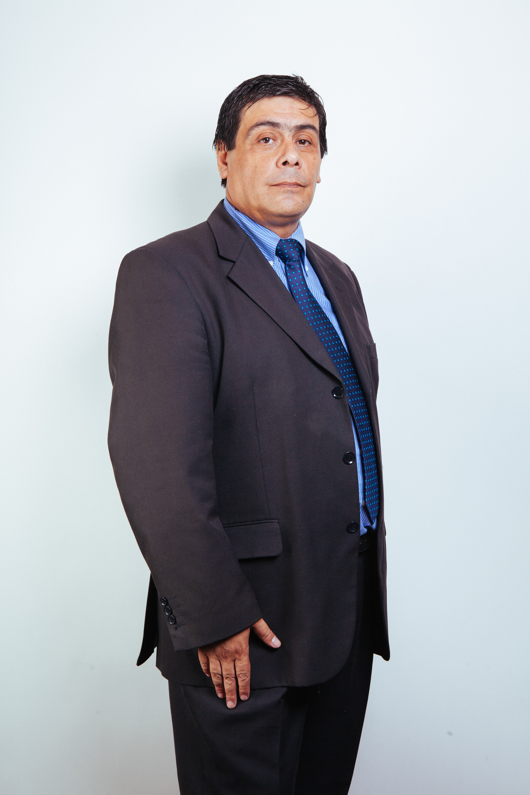 Ministro de Estado del segundo gobierno de Michelle Bachelet (2014-2018)